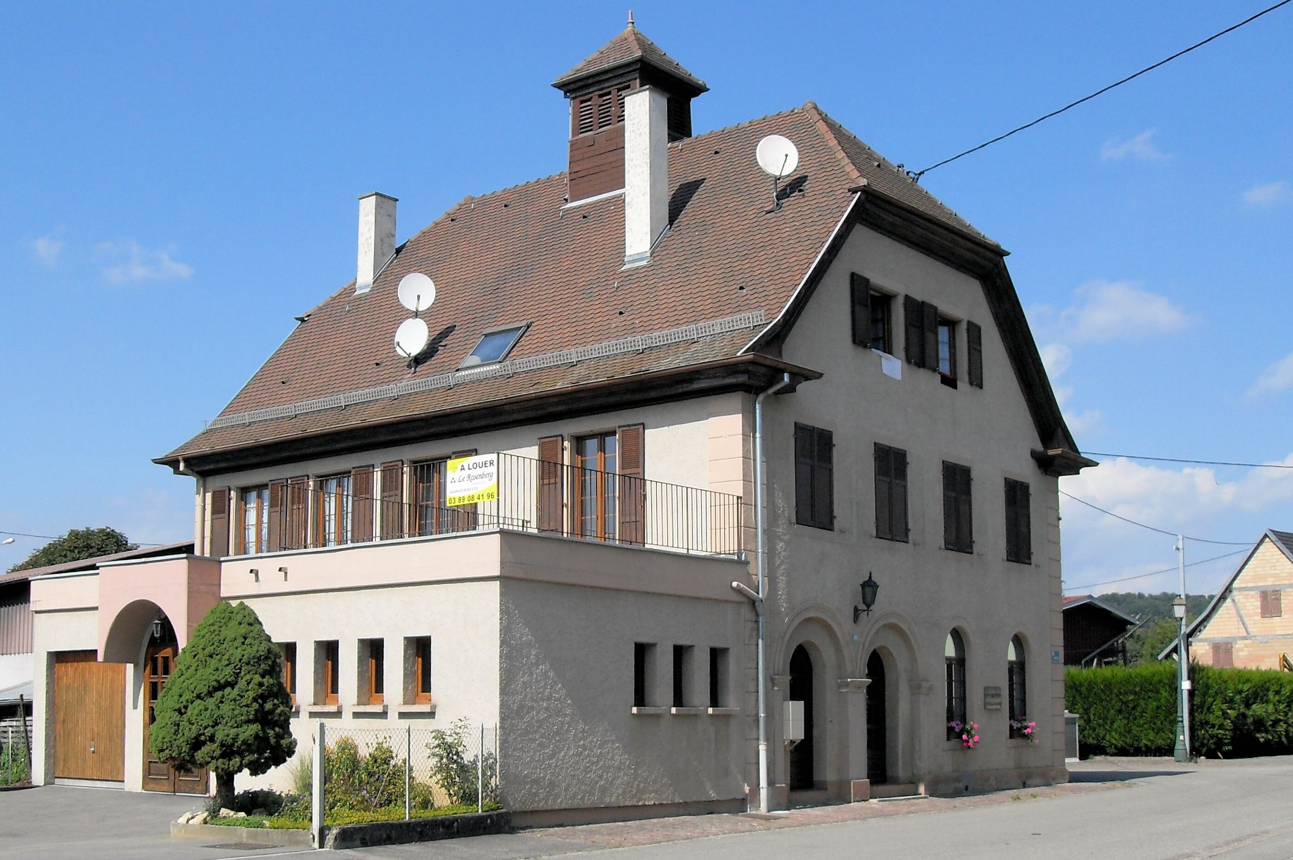 La maison commune de Linsdorf